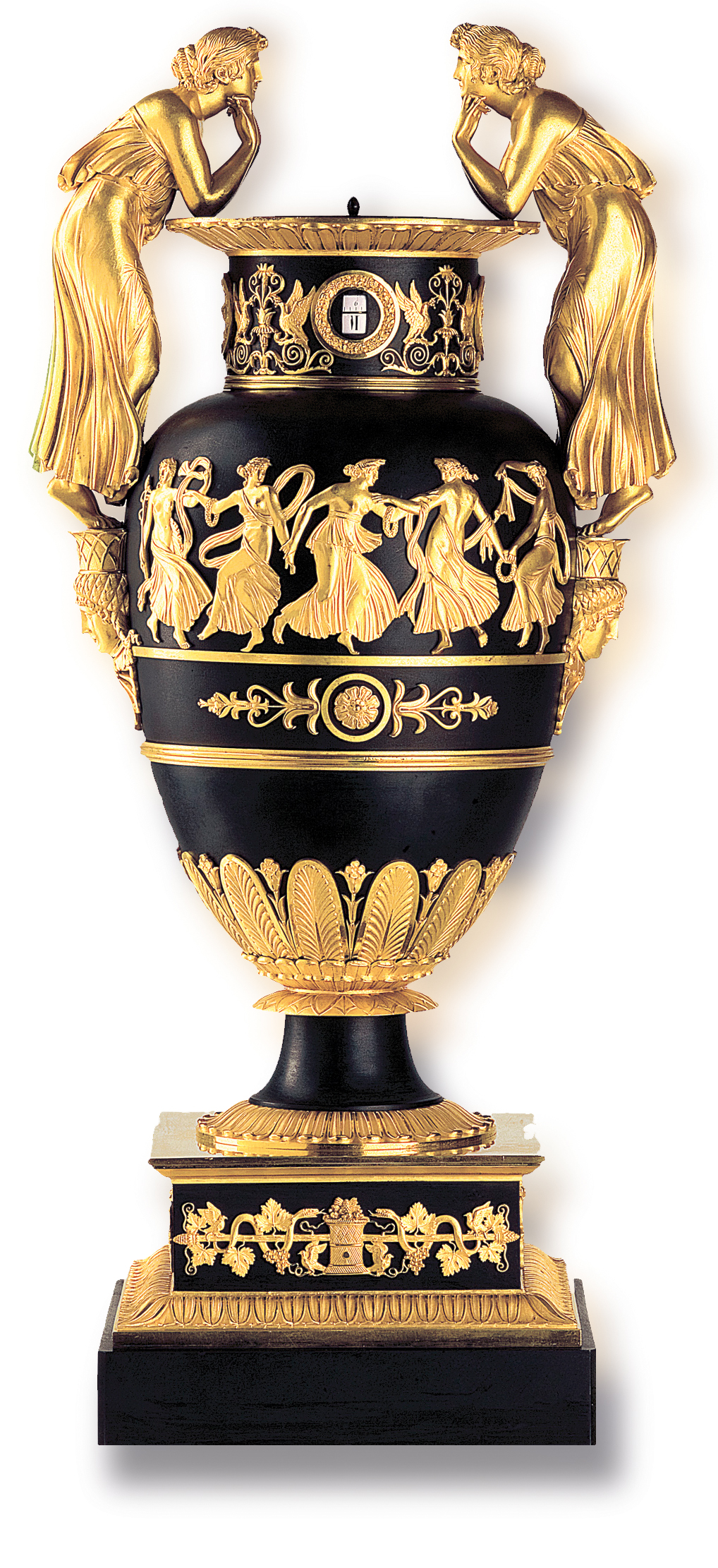 Photographie de la pendule d'Ernst August réalisée par Louis Moinet. Bronzier: Pierre-Philippe Thomire, movement: Louis Moinet.